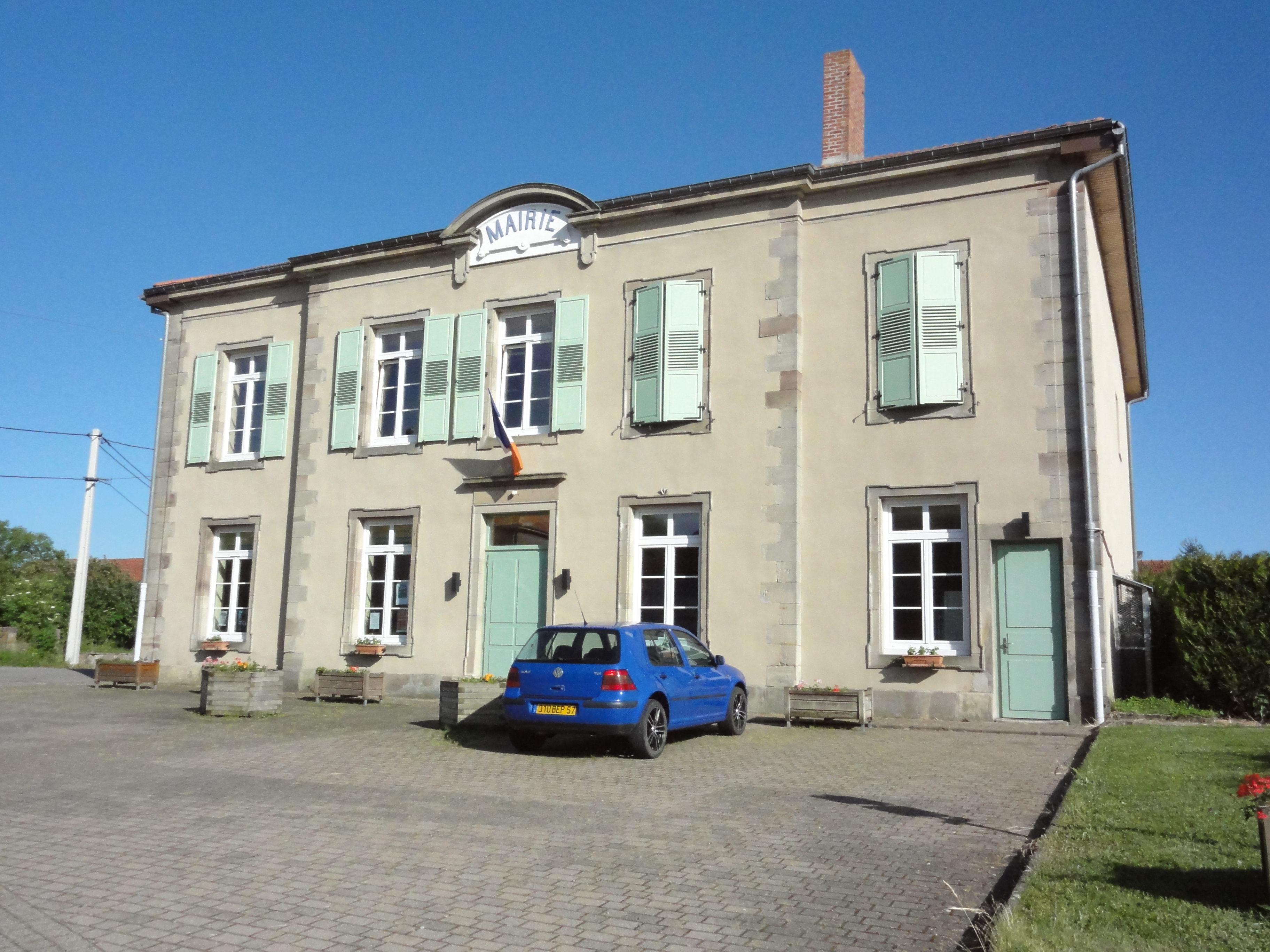 Belles-Forêts (Moselle) mairie à Bisping